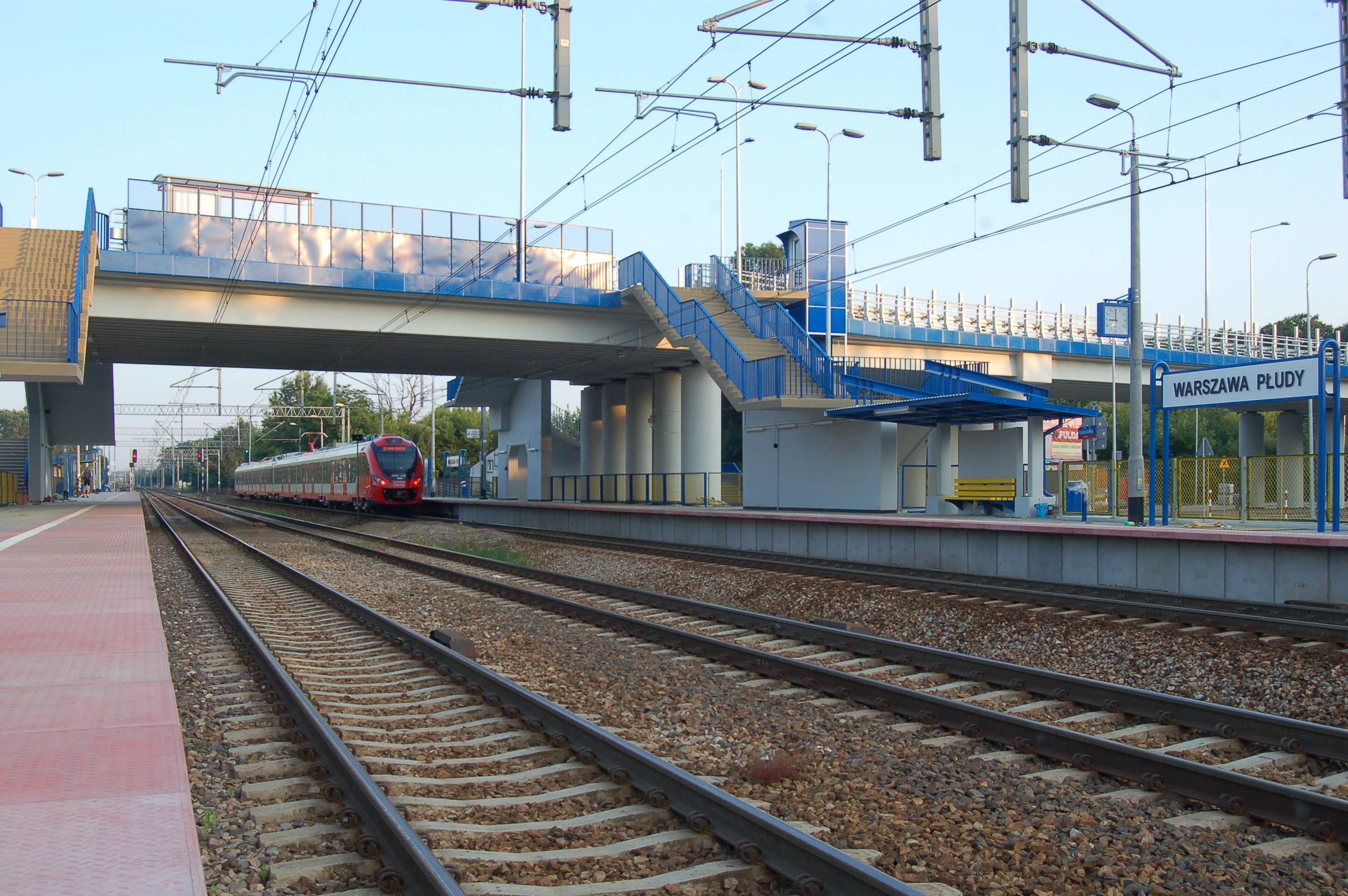 Warszawa Pludy - wiadukt łączący osiedla Płudy oraz Białołęka Dworska